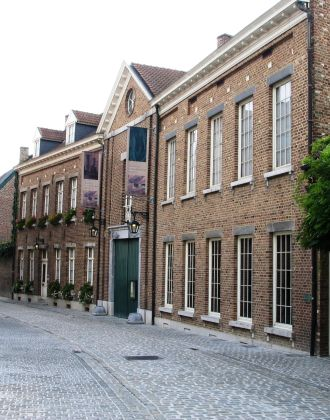 Jenevermuseum te Hasselt - eigen foto